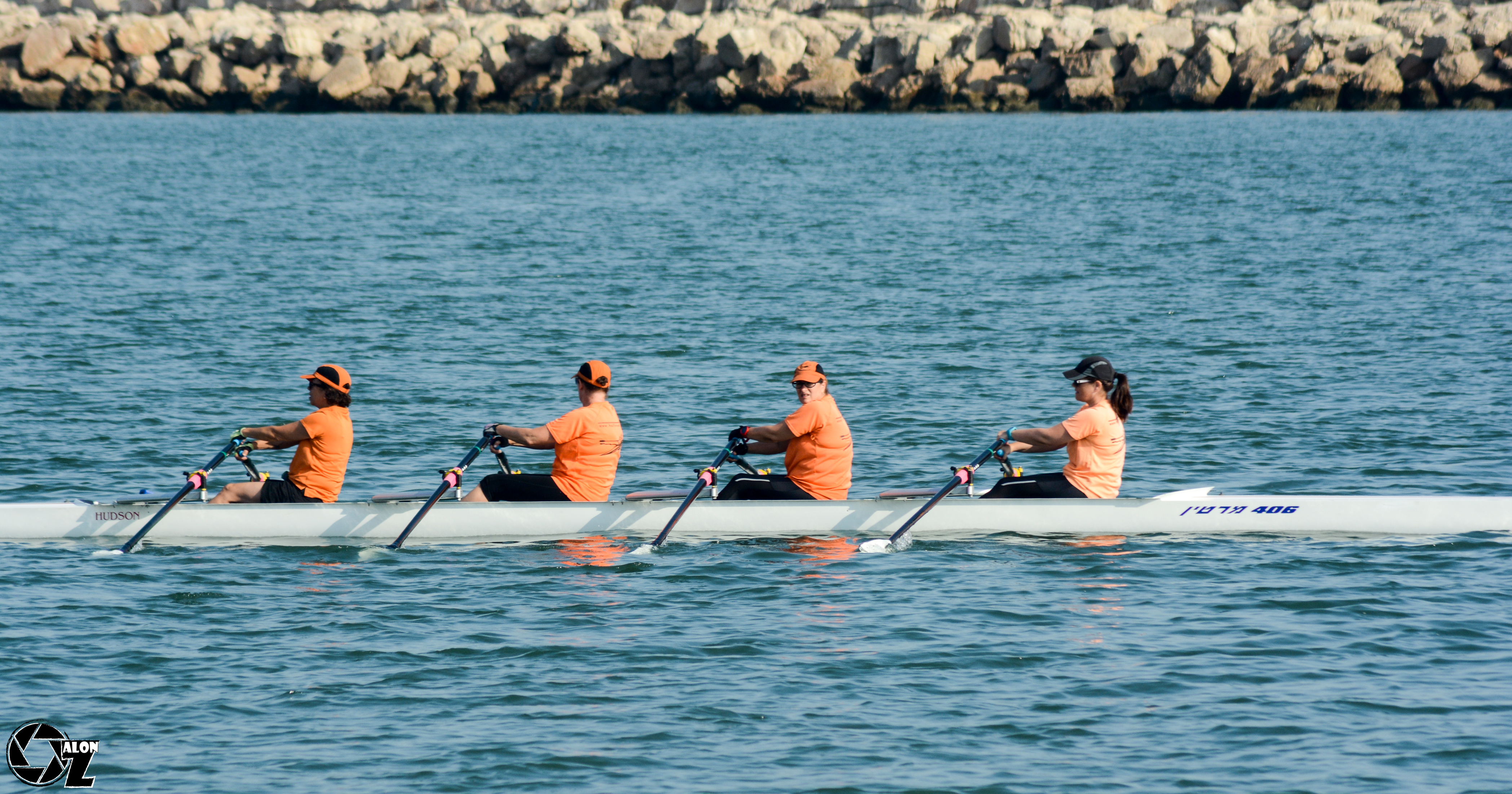 rowing at Haifa rowing club